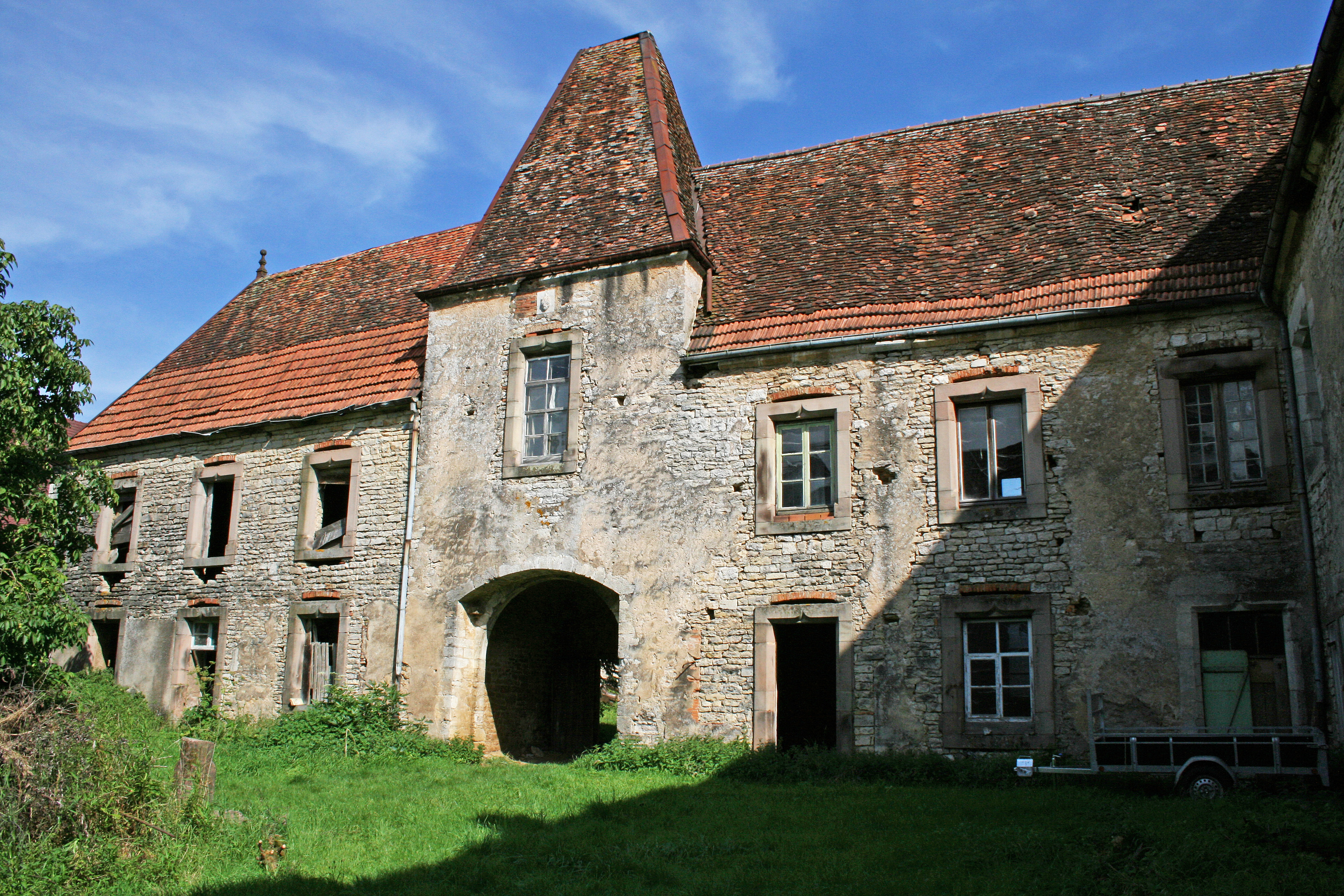 Marast Prieuré Bâtiment conventuel